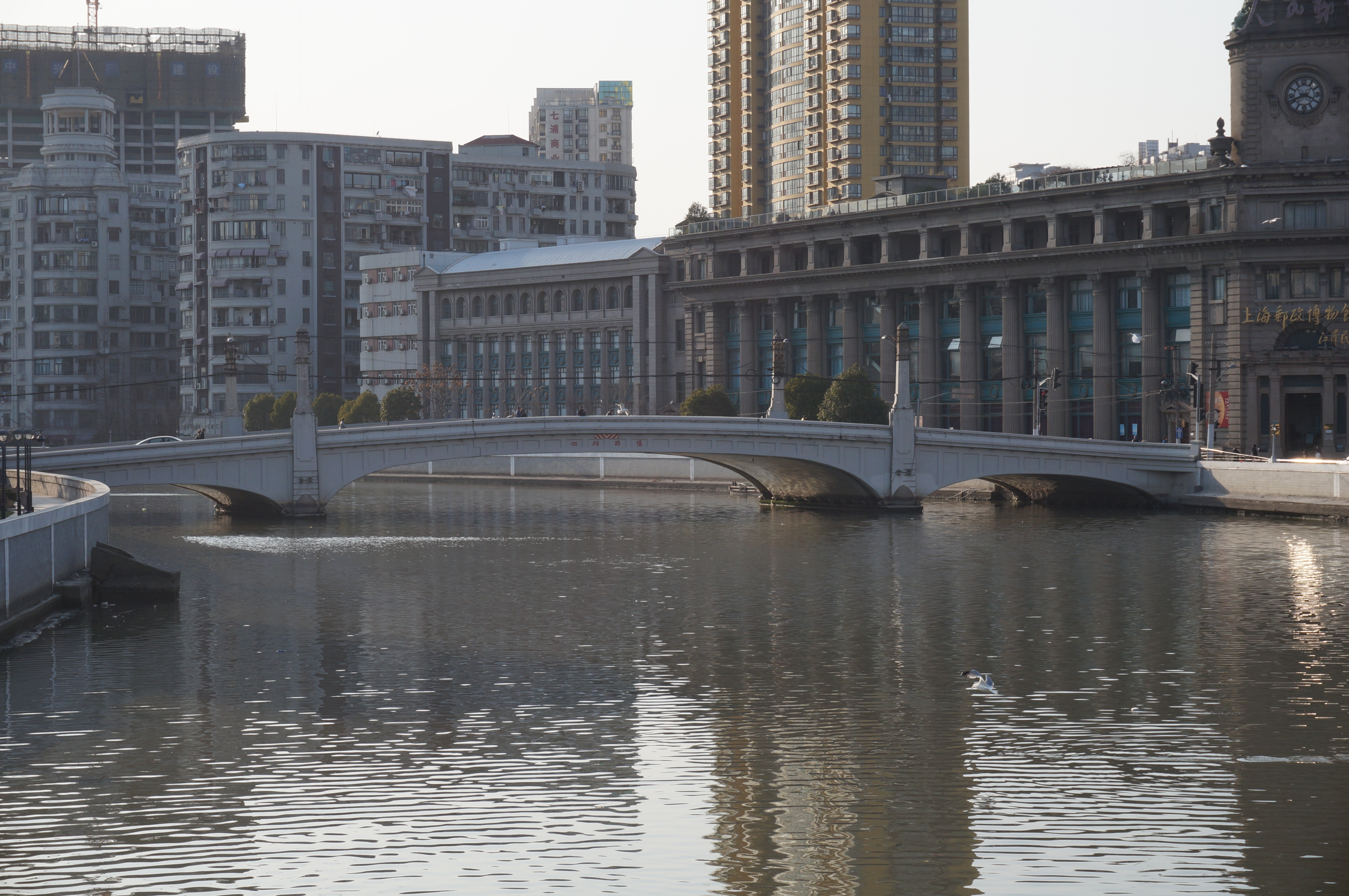 苏州河上的四川路桥